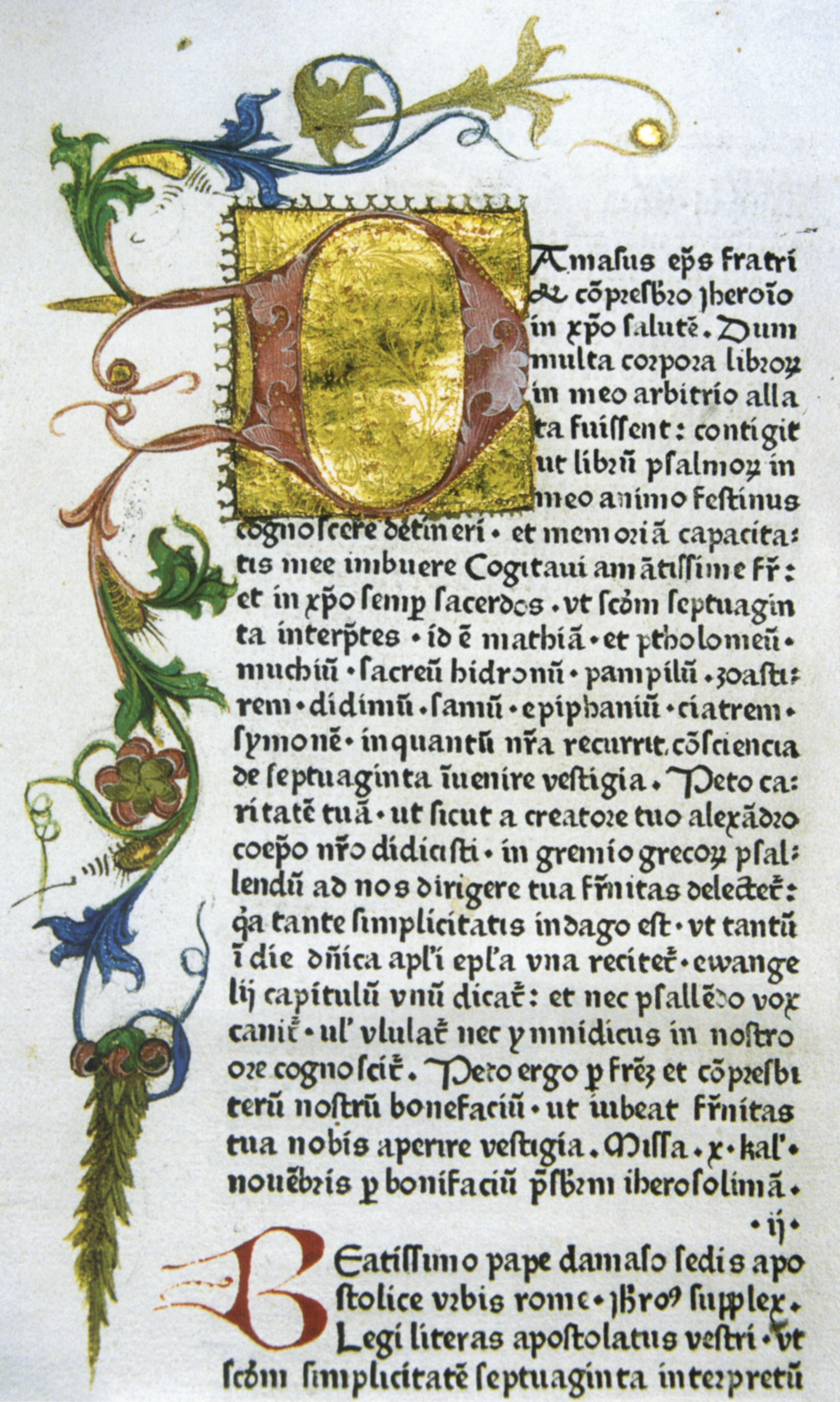 Goldgefasste Initiale aus HIeronymus Stridonensis: Epistolae, Straßburg, Johann Mentelin, nicht nach 1469 (Inkunabel, Prädikantenbibliothek Isny)